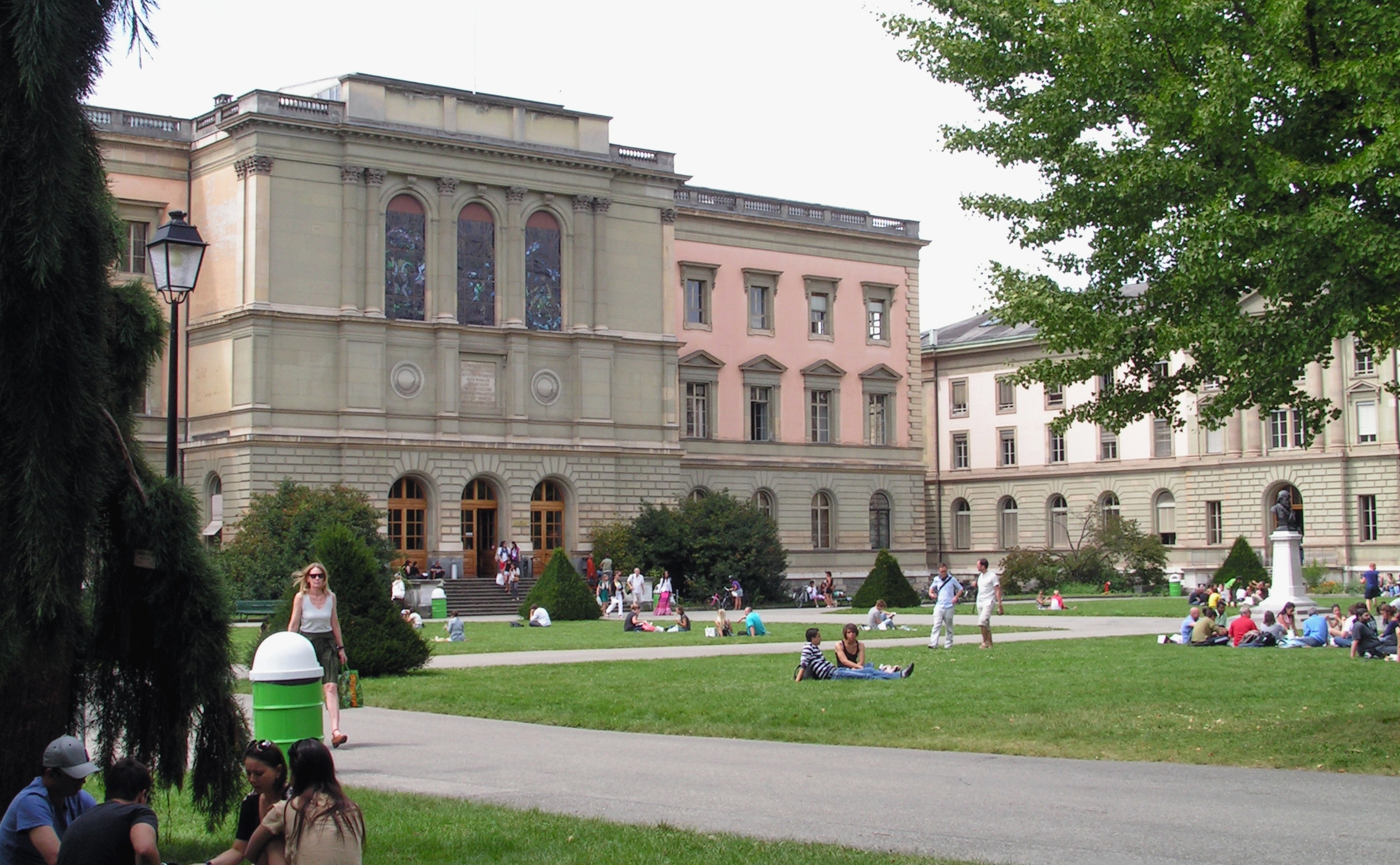 Rue de Candolle 5. Université de Genève. Vue du parc des Bastions.